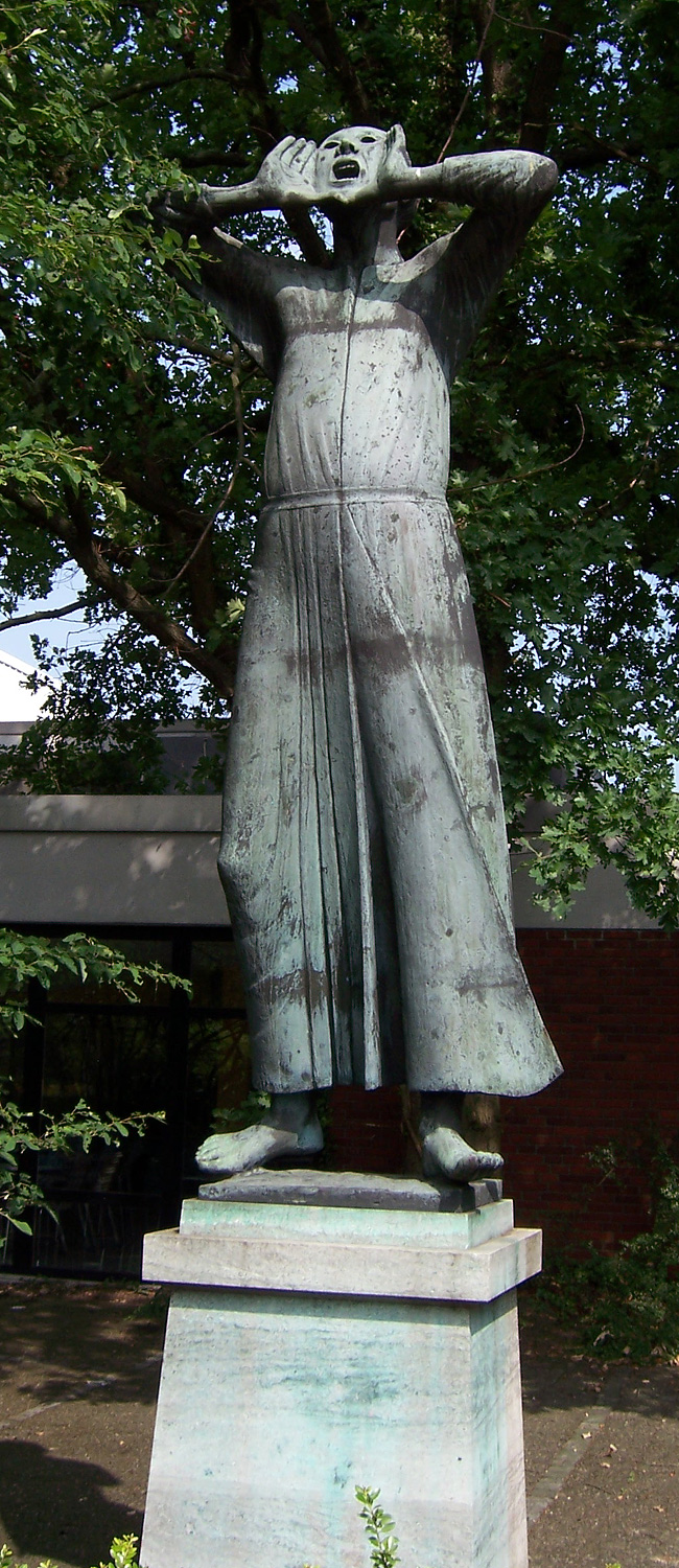 „Der Rufer“ von Gerhard Marcks am Fernsehstudio von Radio Bremen, Hans-Bredow-Straße 10. Einweihung am 24. November 1967.